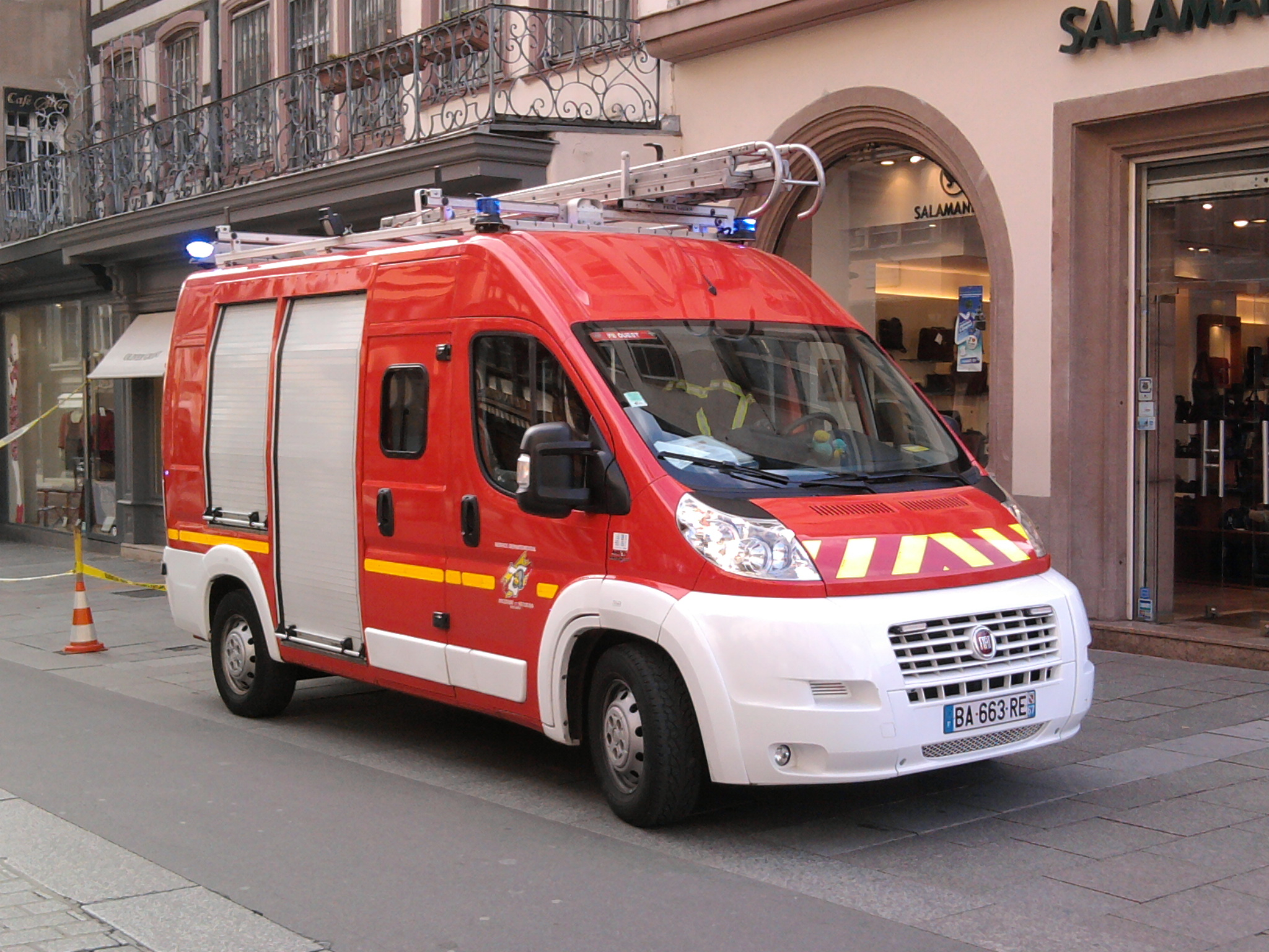 Fourgon d'intervention Fiat Ducato des sapeurs-pompiers de Strasbourg